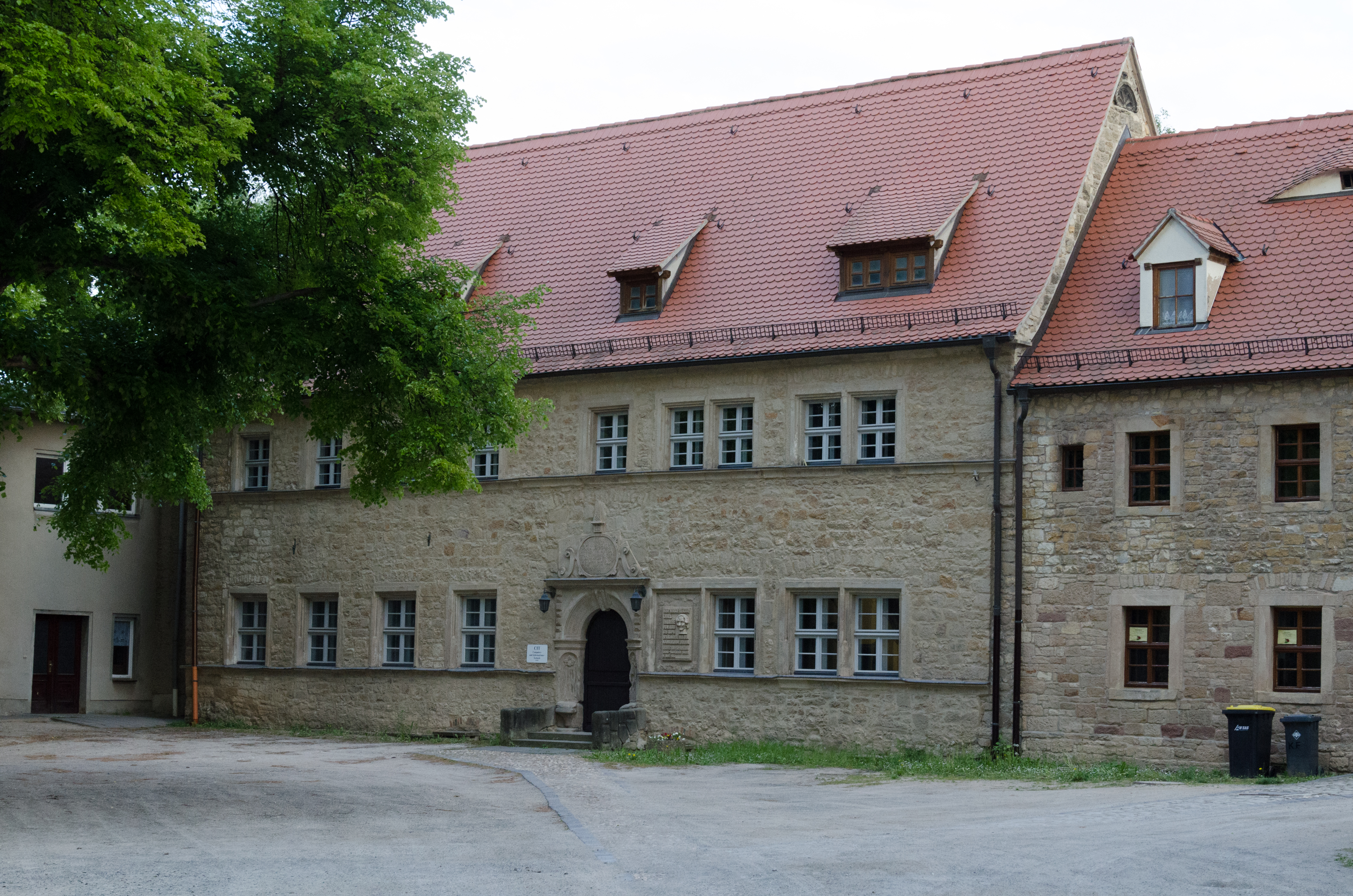 Laucha an der Unstrut, Thomae Platz 5